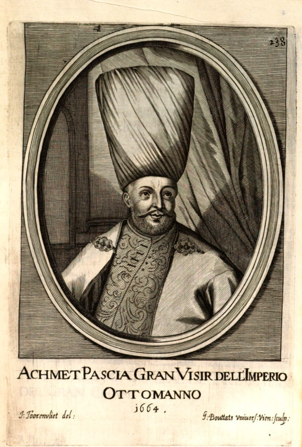 Achmet Pascia, gran visir del Imperio otomano; grabado de Gerard Bouttats por dibujo de Jacob Toorenvliet. Historia di Leopoldo Cesare, Viena, 1670